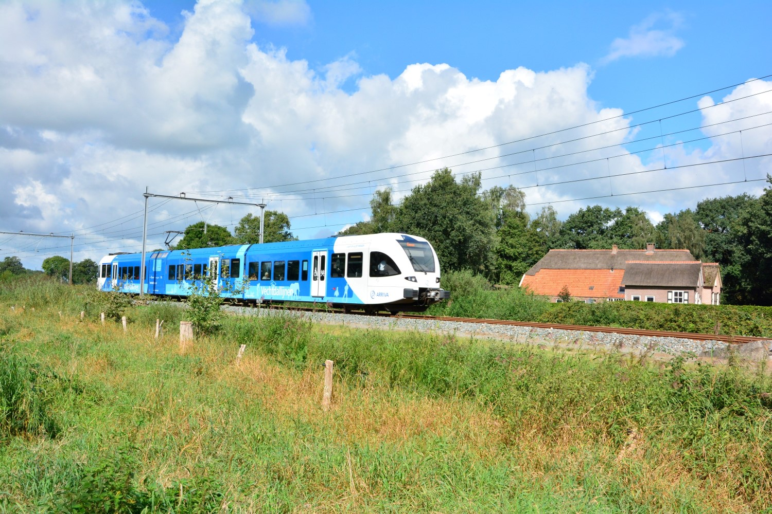 Arriva 10524 'Jaap en Aleid Rensen'